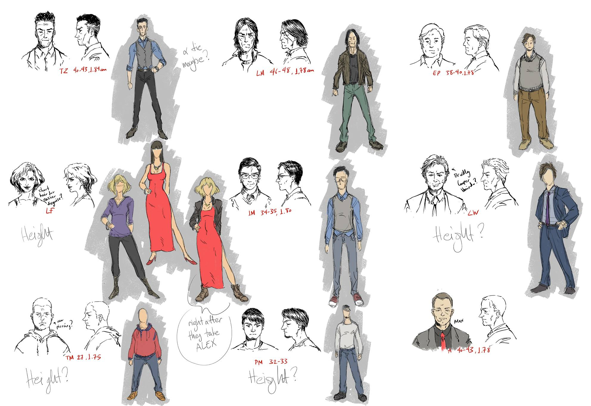 На малюнку демонструється процесс створення одягу героїв.